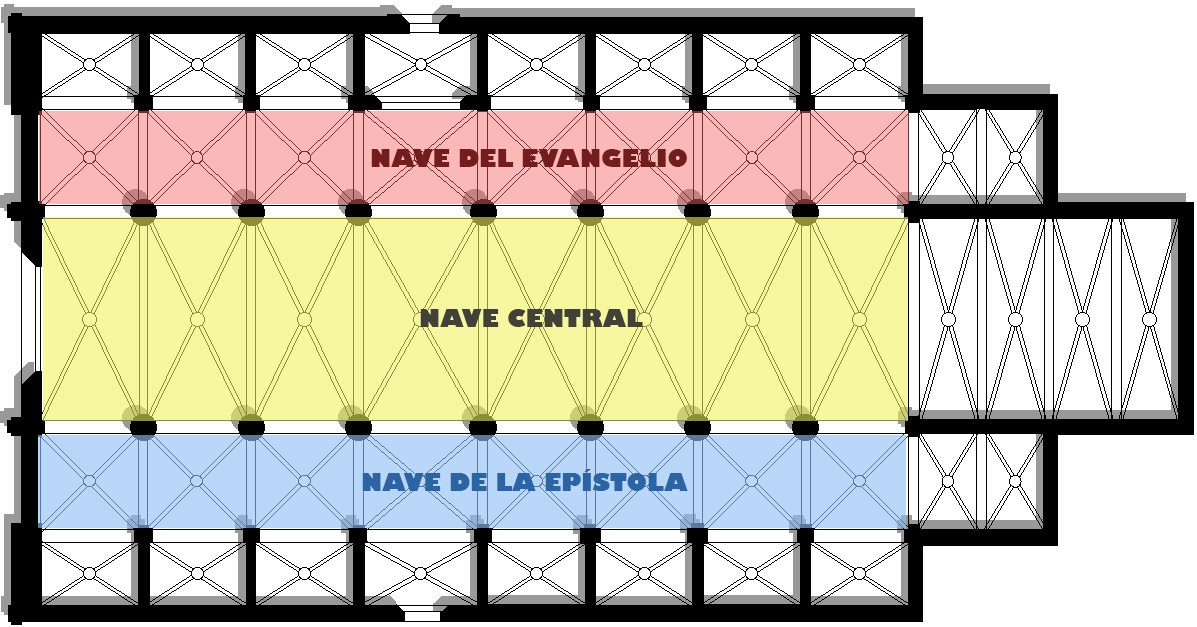 Planta de la catedral de Palma de Mallorca, España. Es una planta de salón sin crucero ni girola y contres capillas rectangulares paralelas en la cabecera